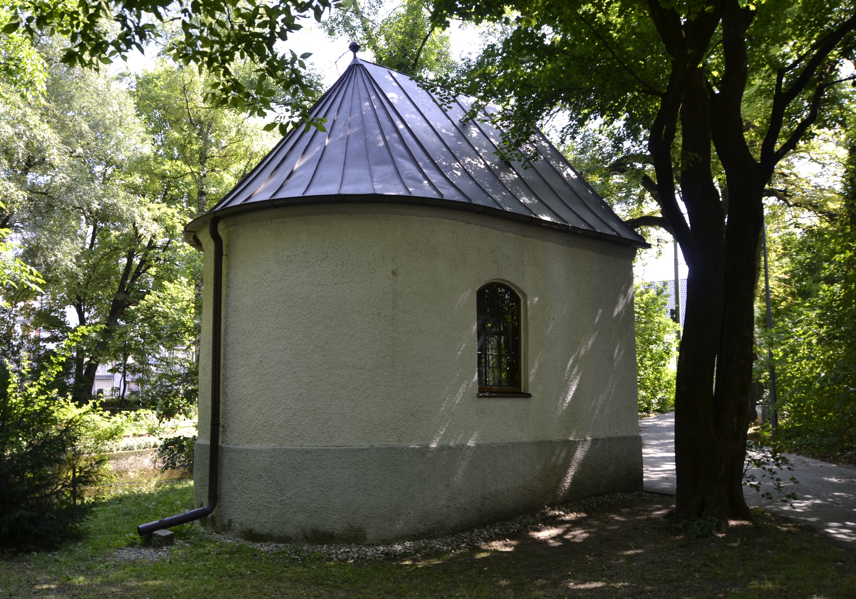 Die Johann-Nepomuk-Kapelle liegt im Münchner Stadtteil Pasing direkt an der Würm.